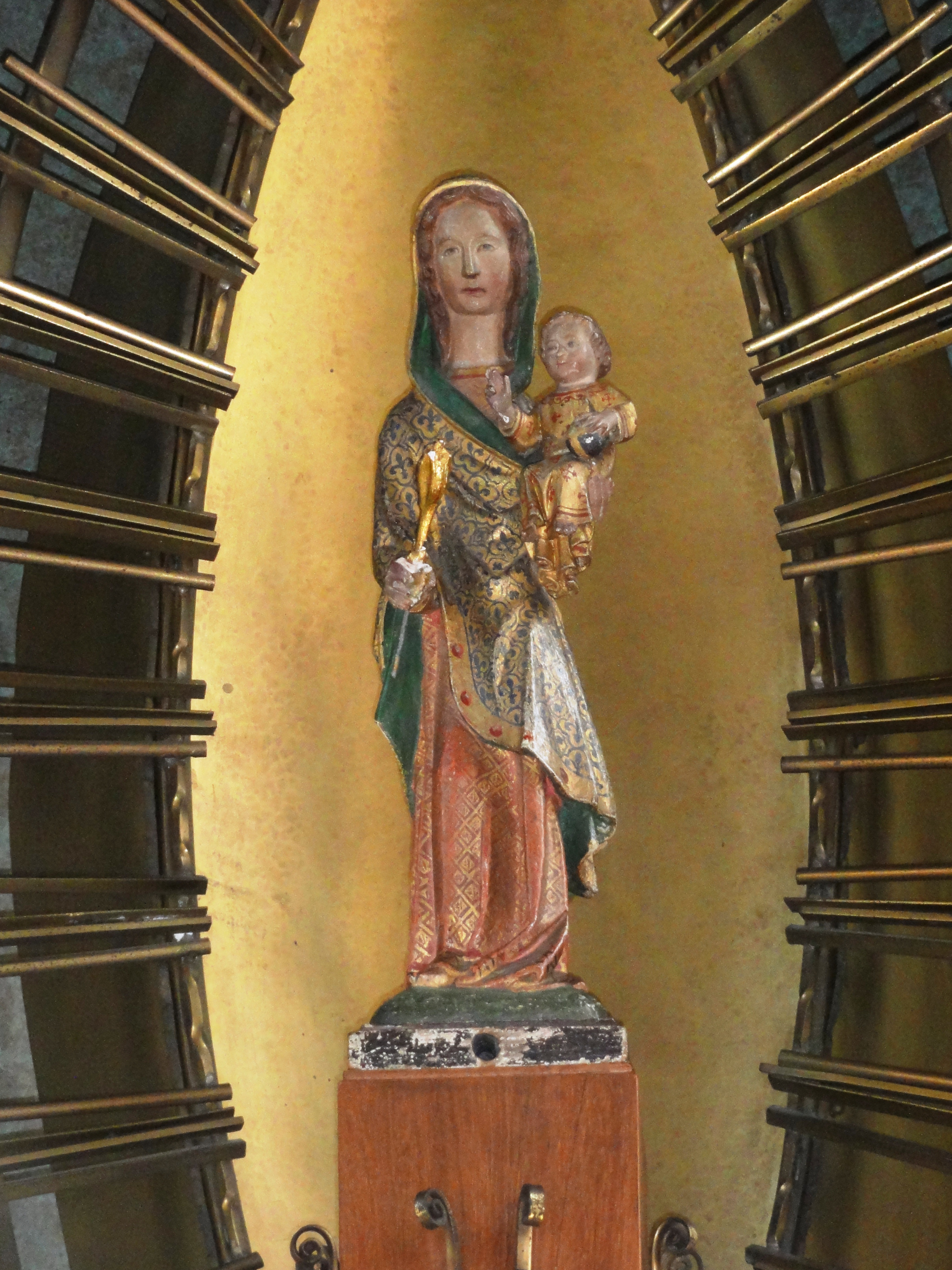 Venray Oostrum, L.V. kerk Mariabeeld (15e eeuw) van Maria-altaar